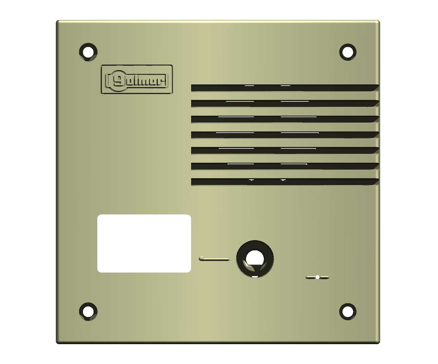 Placa porter antivàndalica